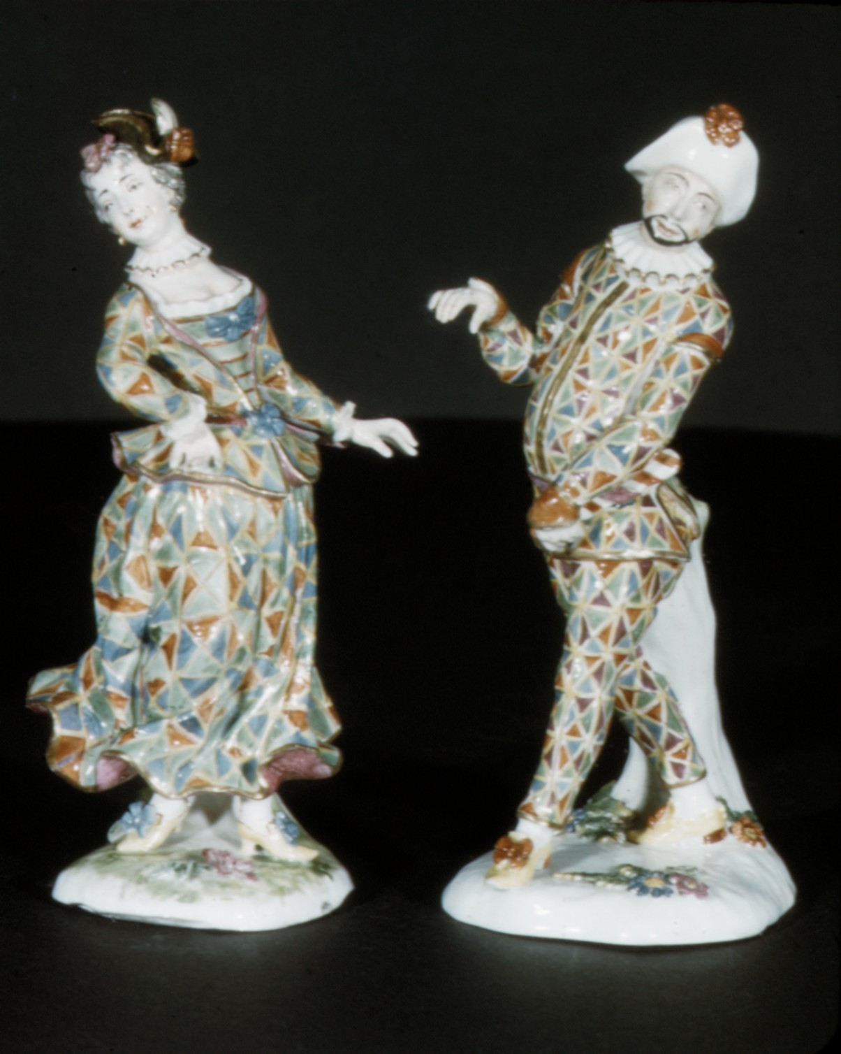 German, Fürstenberg; Figure; Ceramics-Porcelain